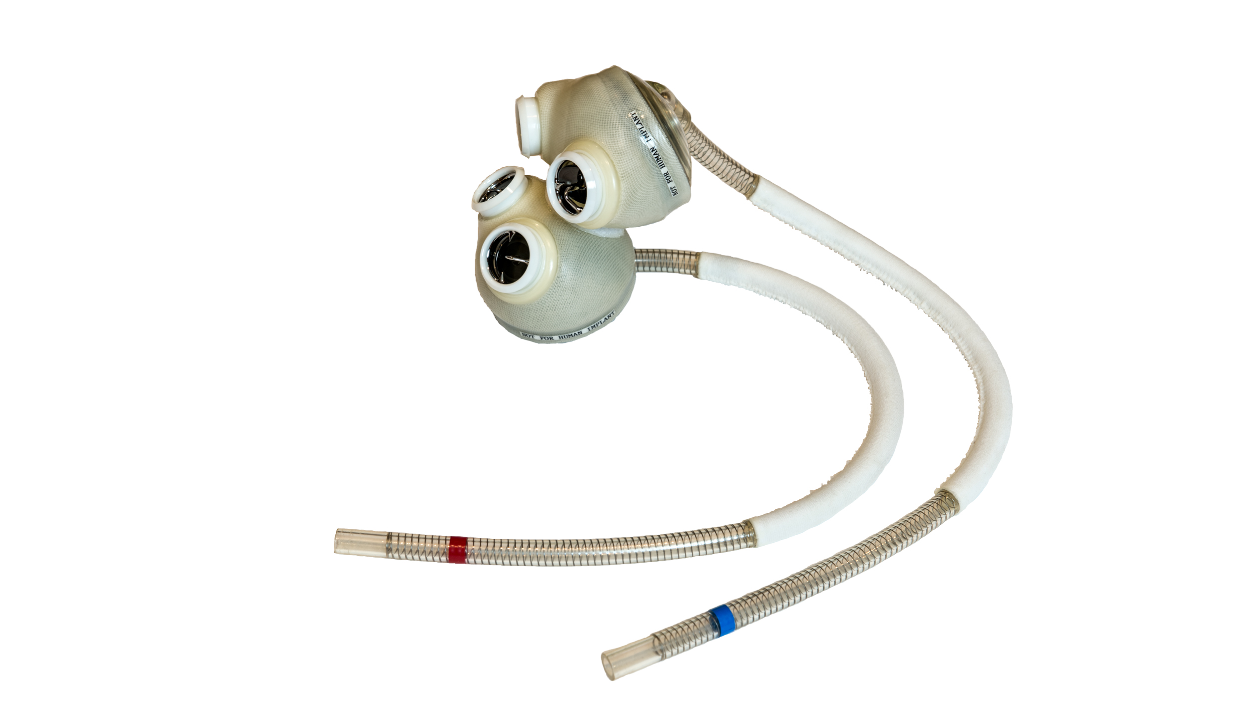 Prototipo di cuore artificiale totale "CardioWest 70cc". L'originale è stato impiantato nel dicembre del 2007 in un paziente affetto da insufficienza cardiaca in fase terminale. Il cuore artificiale ha garantito la vita del paziente per 1374 giorni fino al trapianto cardiaco effettuato con successo nel settembre del 2011. Al 2015 1374 giorni rappresentano il periodo più lungo di sopravvivenza con un cuore artificiale.